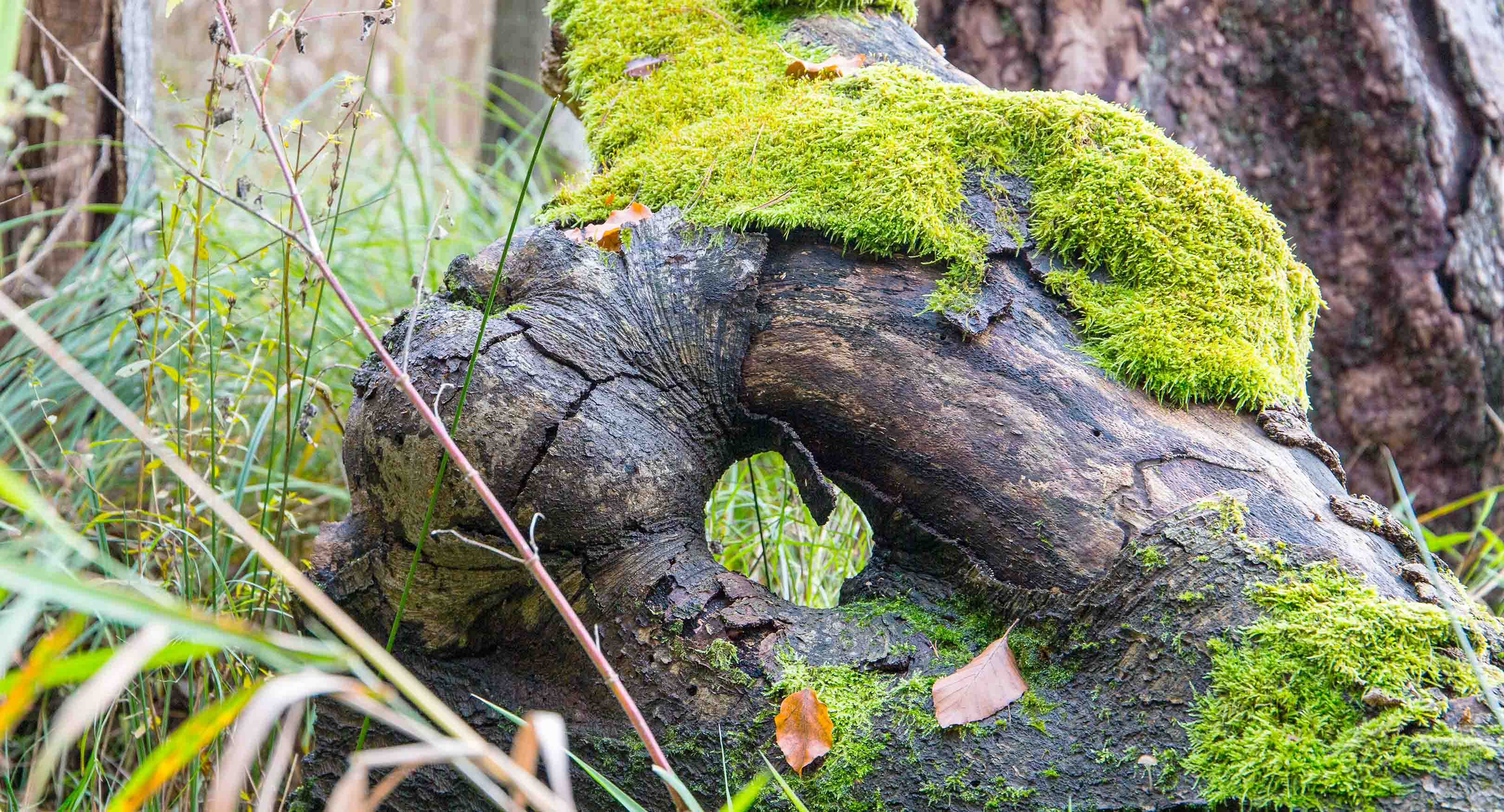 Bemooster Ring eines Baumstamms in Mecklenburg